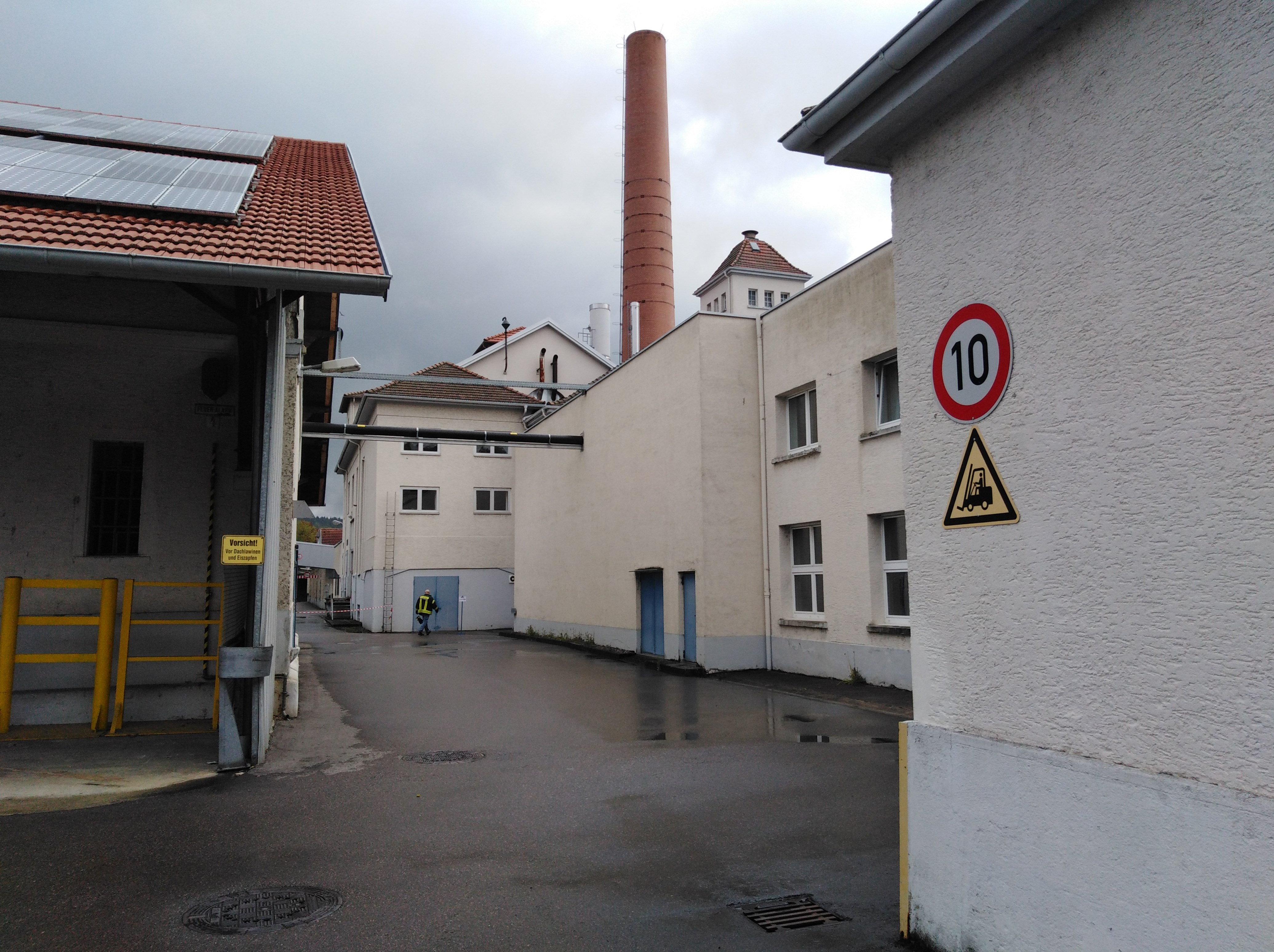 LM Firma Lauffenmühle in Lauchringen. Gelände mit Schornstein (Tag der Offenen Tür am 4. Mai 2019).